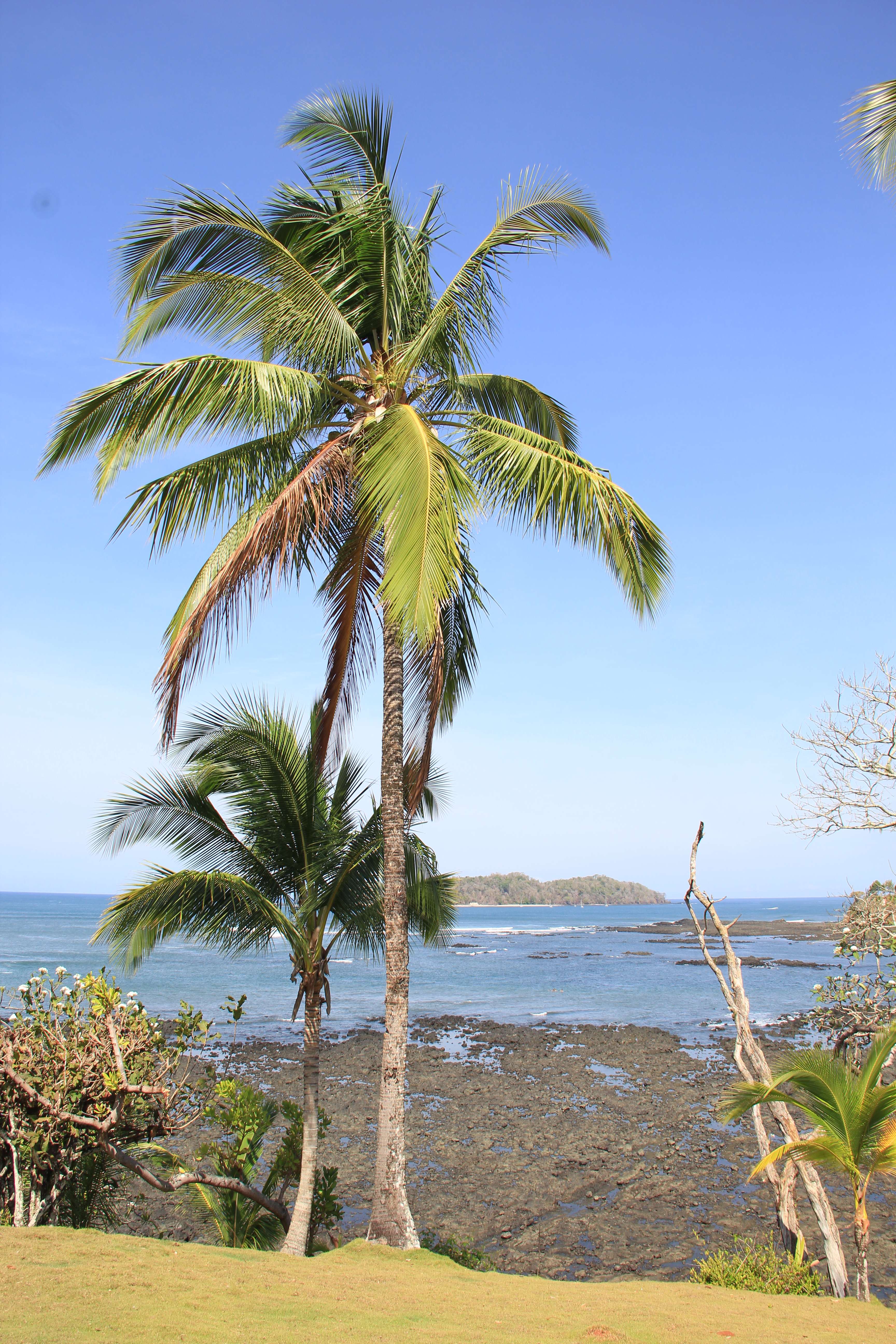 Playa Santa Catalina, Provincia de Veraguas, Panamá.